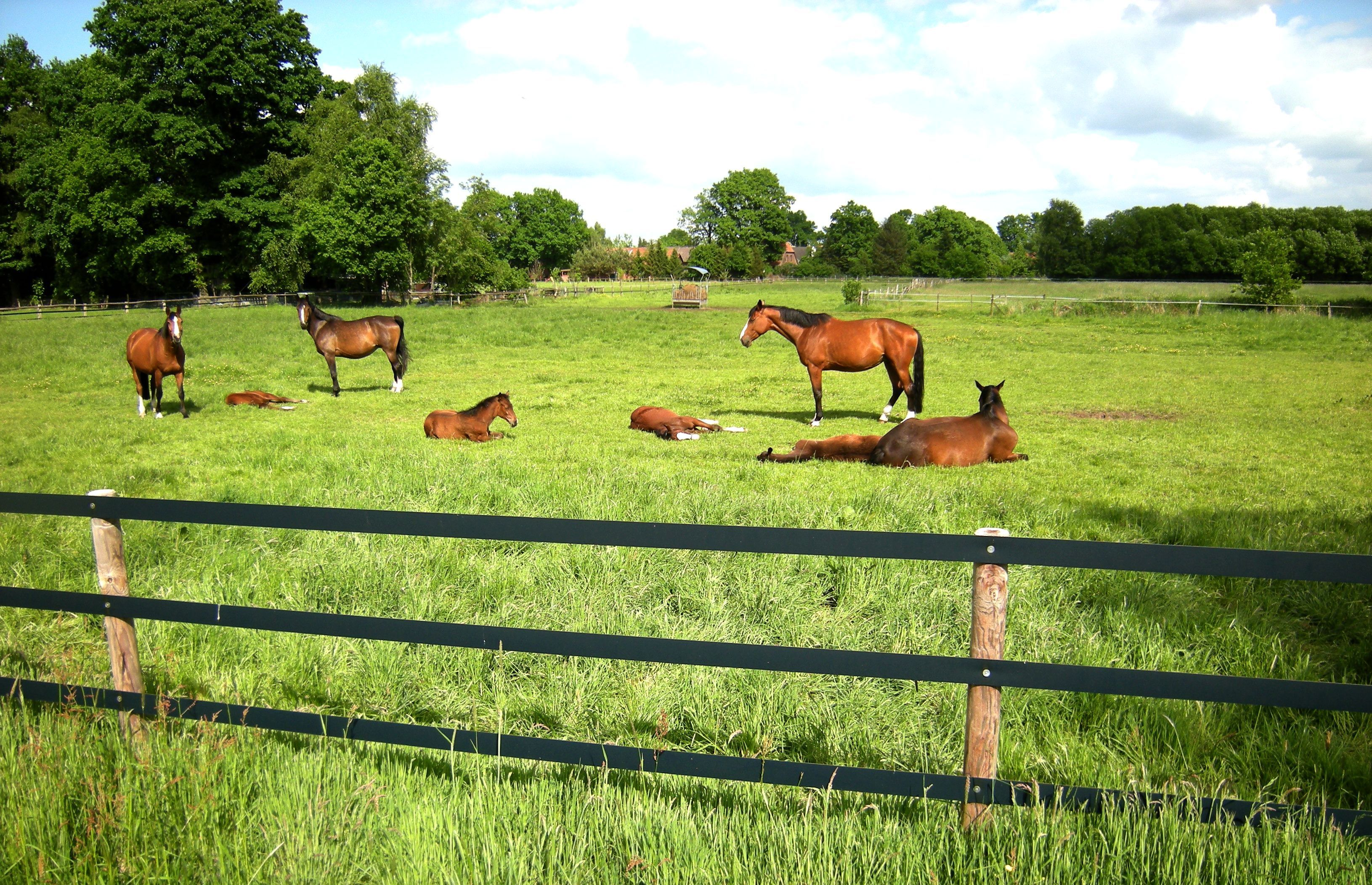 Verden -Pferde in der Koppel.jpg